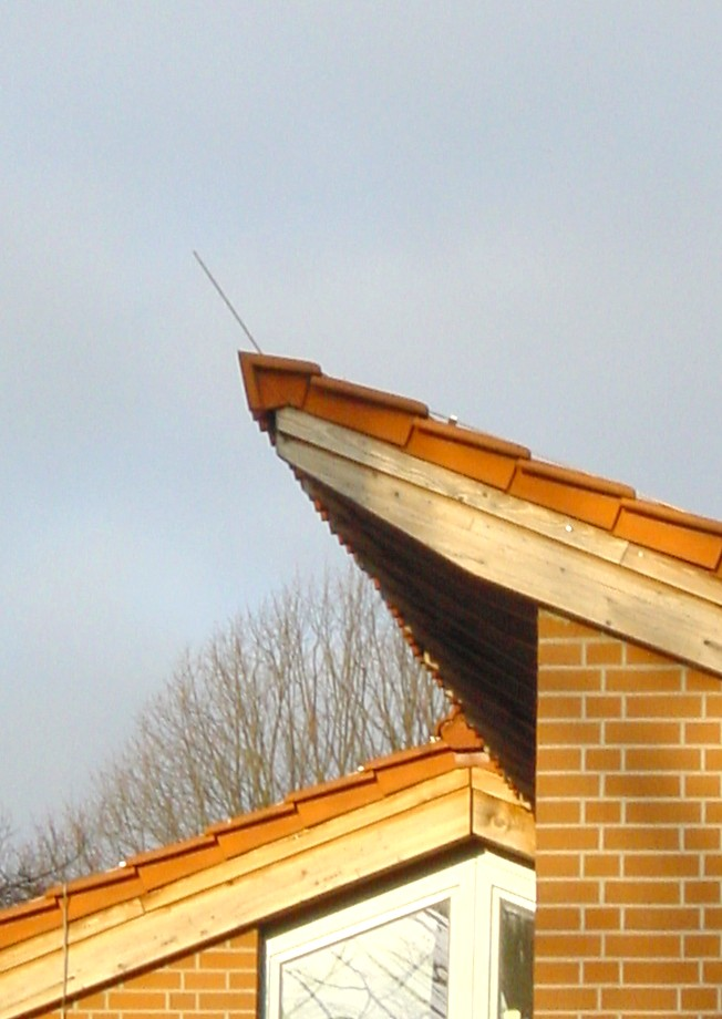 Bildbeschreibung: Blitzableiter Quelle: selbst fotografiert Datum: 30.01.2006 Fotograf/Zeichner: DER UNFASSBARE